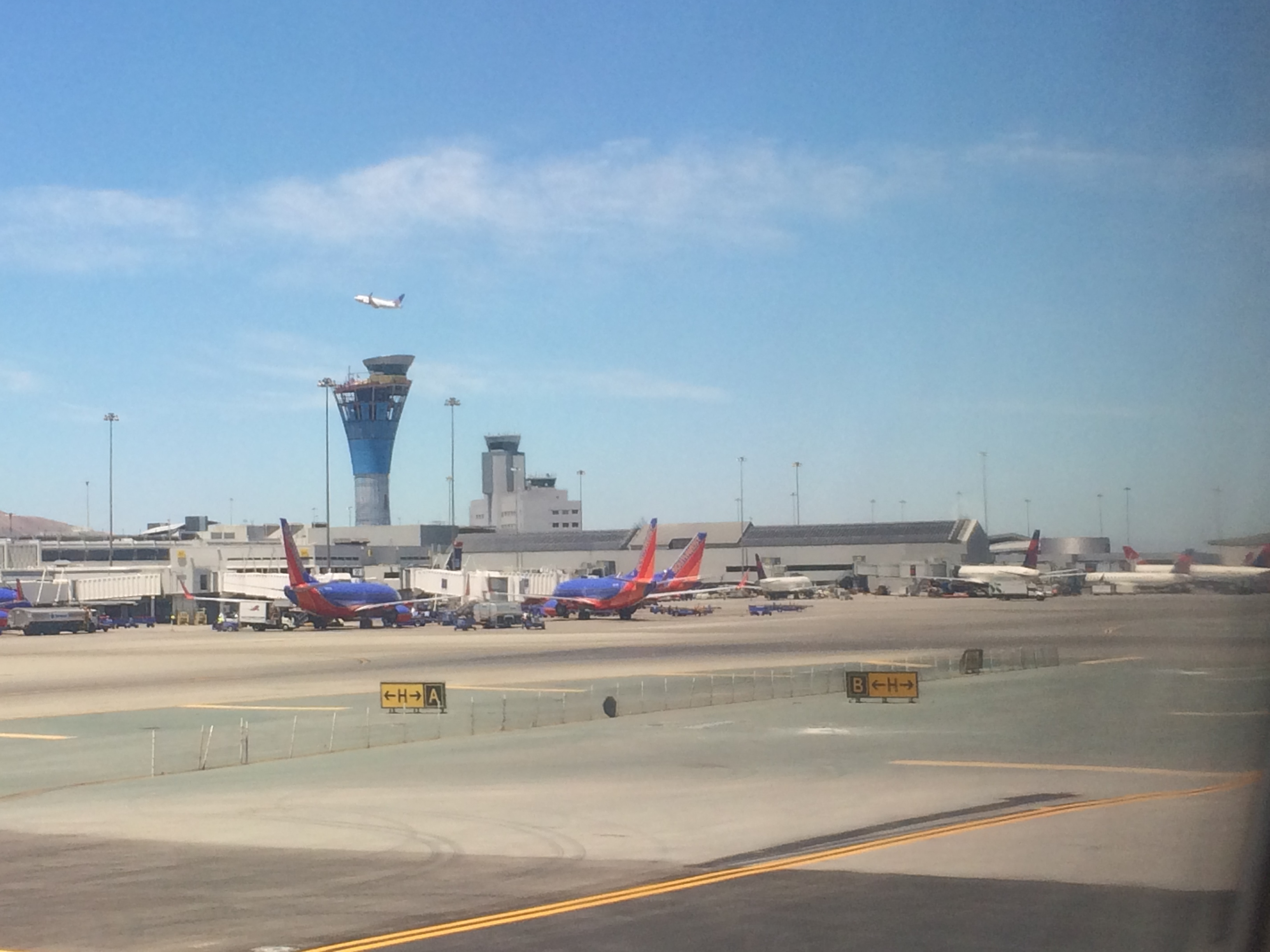 Vista del lado aire del Aeropuerto Internacional de San Francisco.